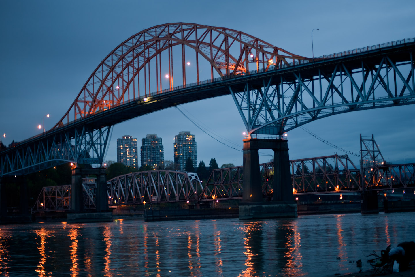 patullo